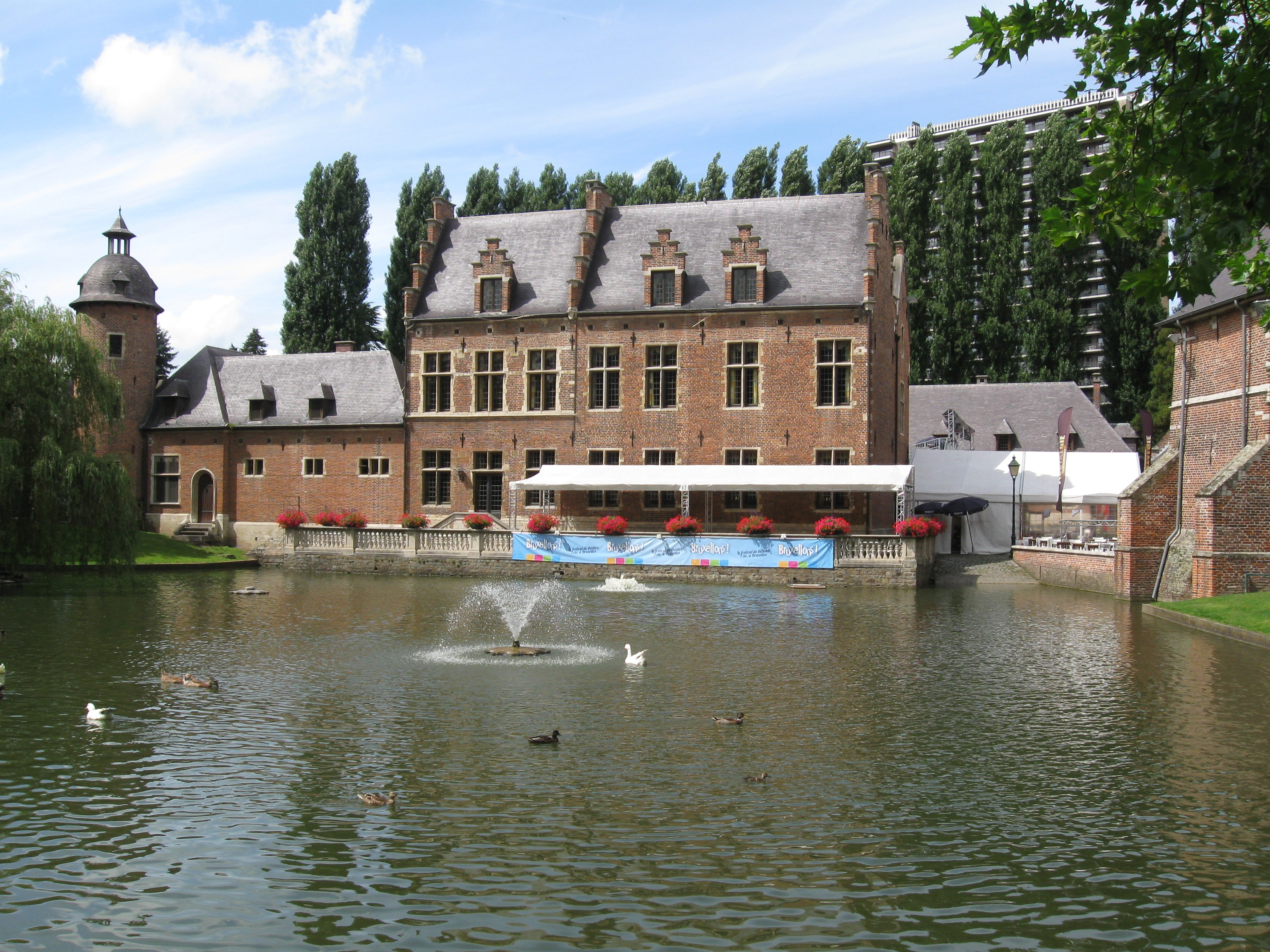 Karreveldhoeve in hoog-Molenbeek